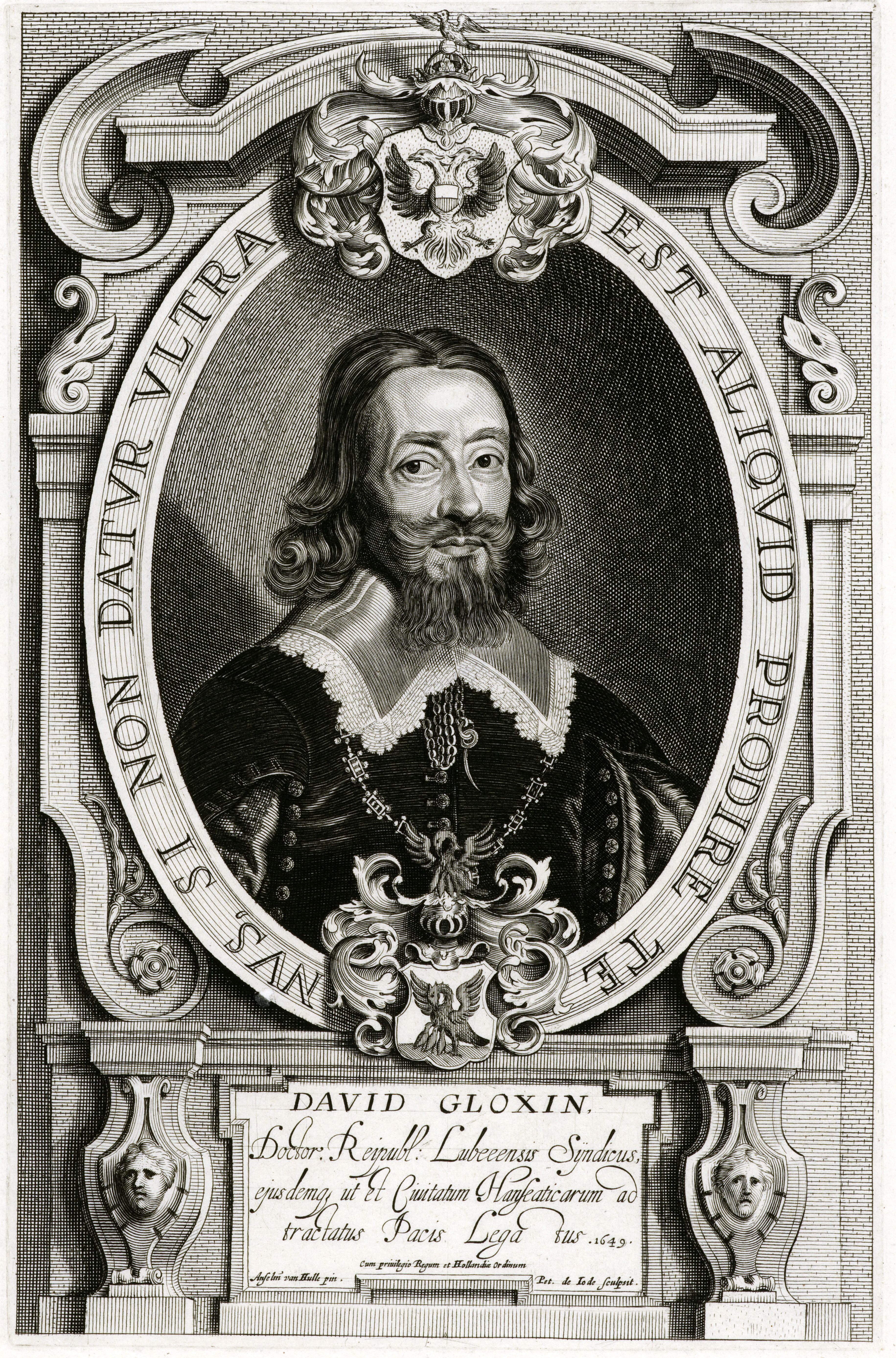 Bildnis von David Gloxin